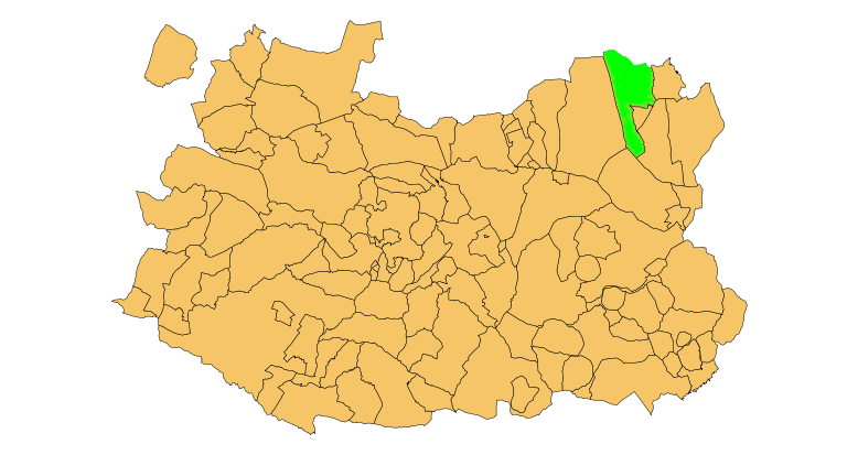 Campo de Criptana (Spain) municipality map